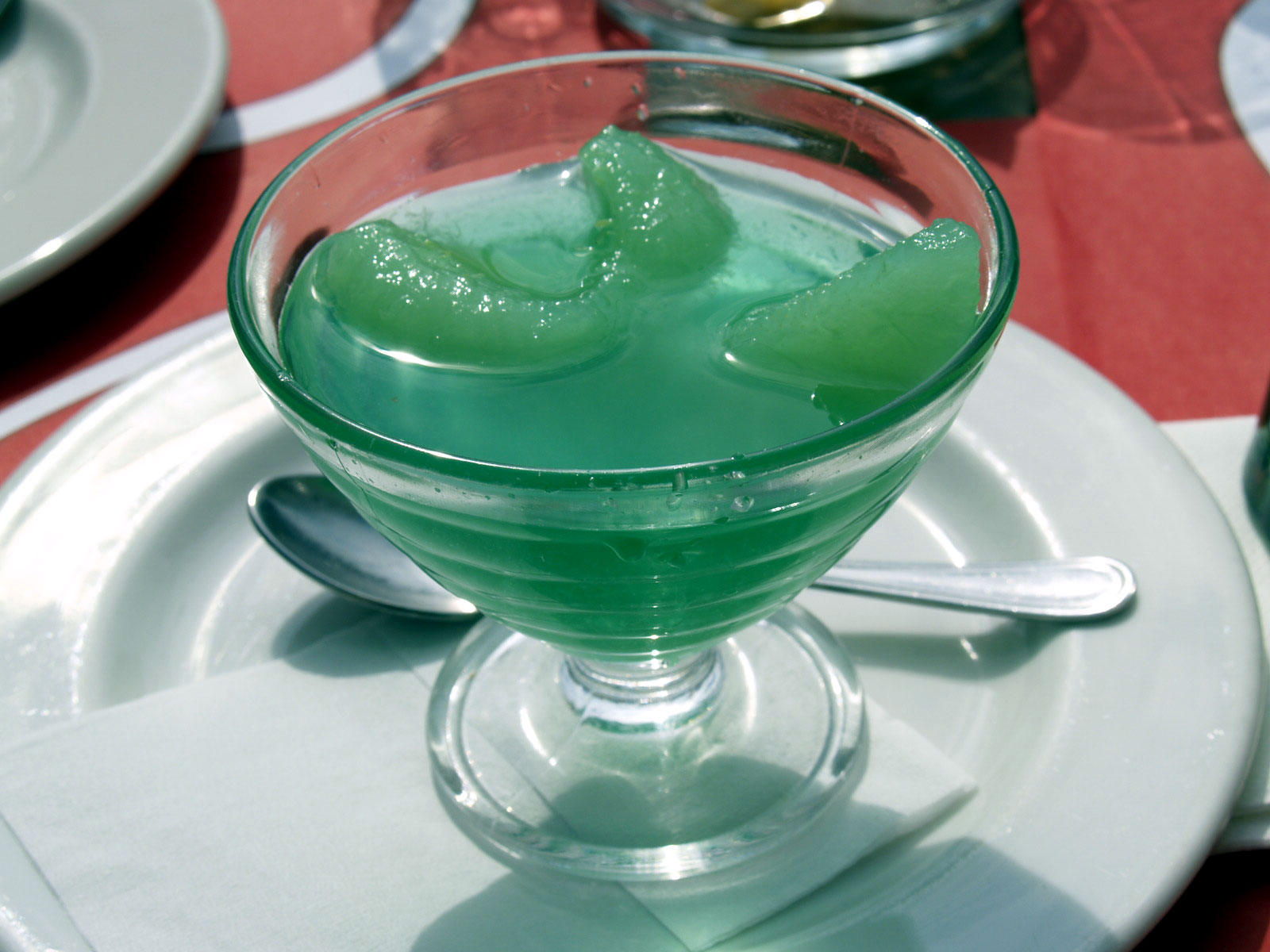 Pærer i mynte